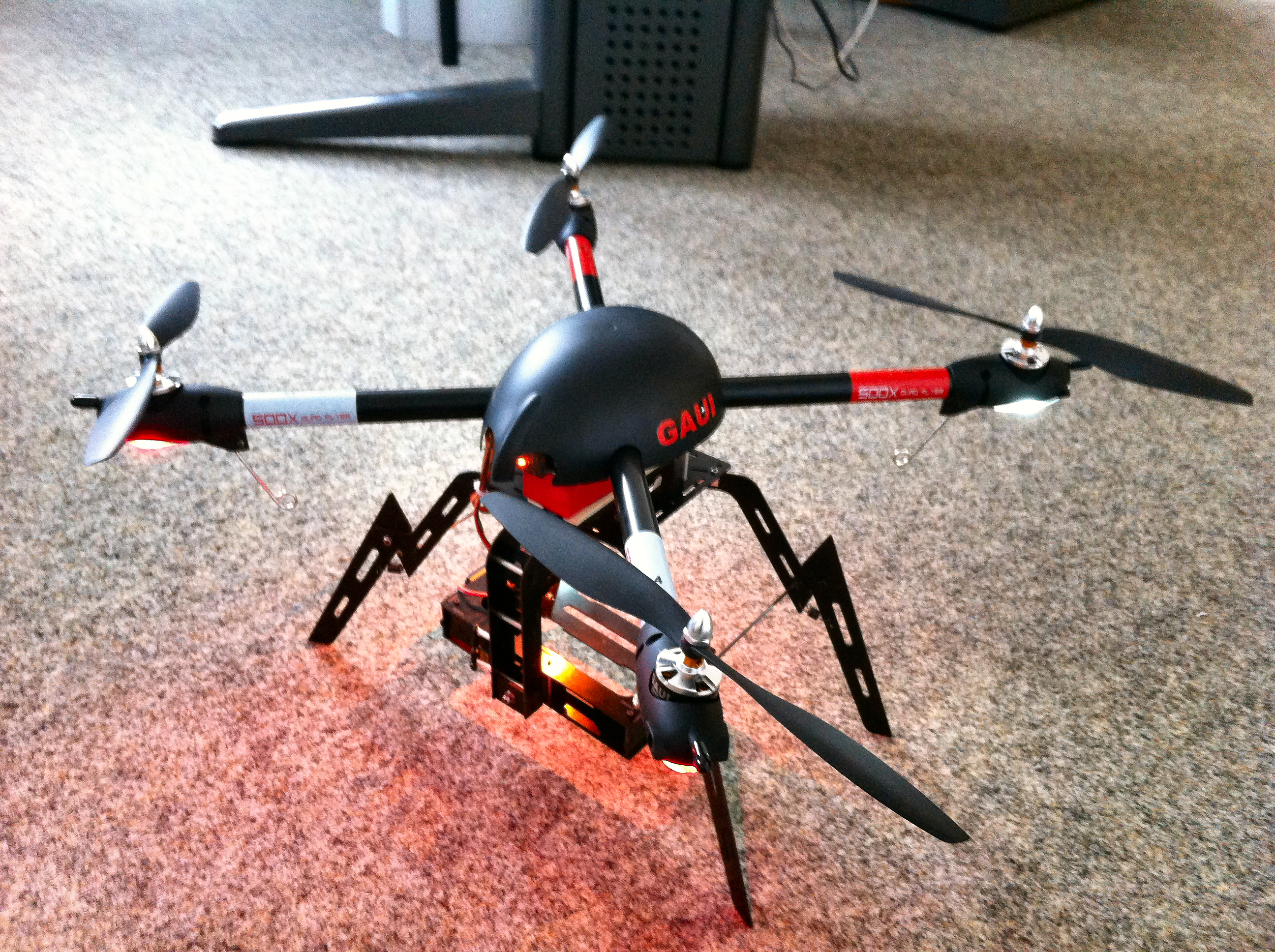 Ferngesteuerter Modell-Quadrocopter